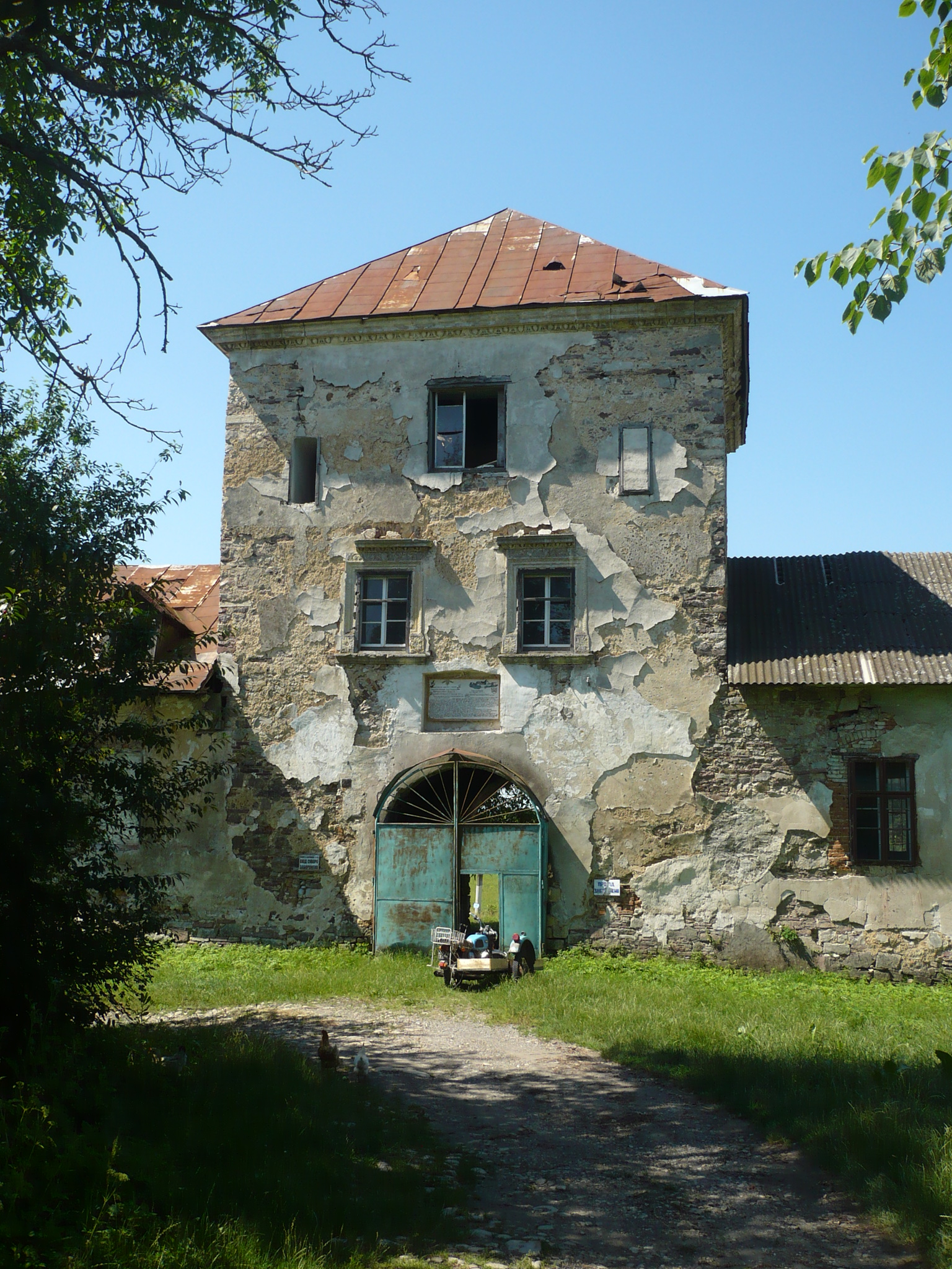 Potok Złoty. Zamek